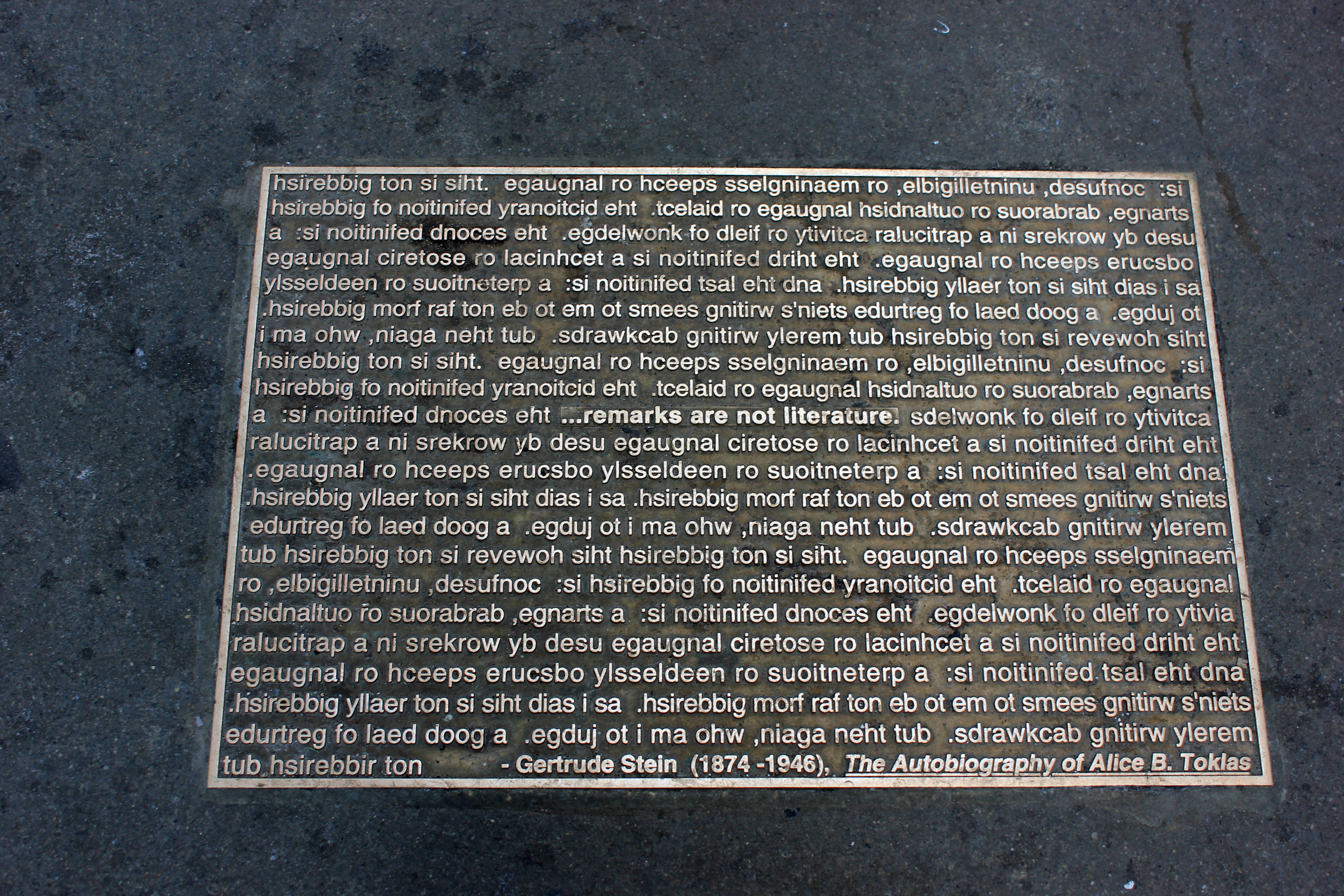 Library Walk New York City